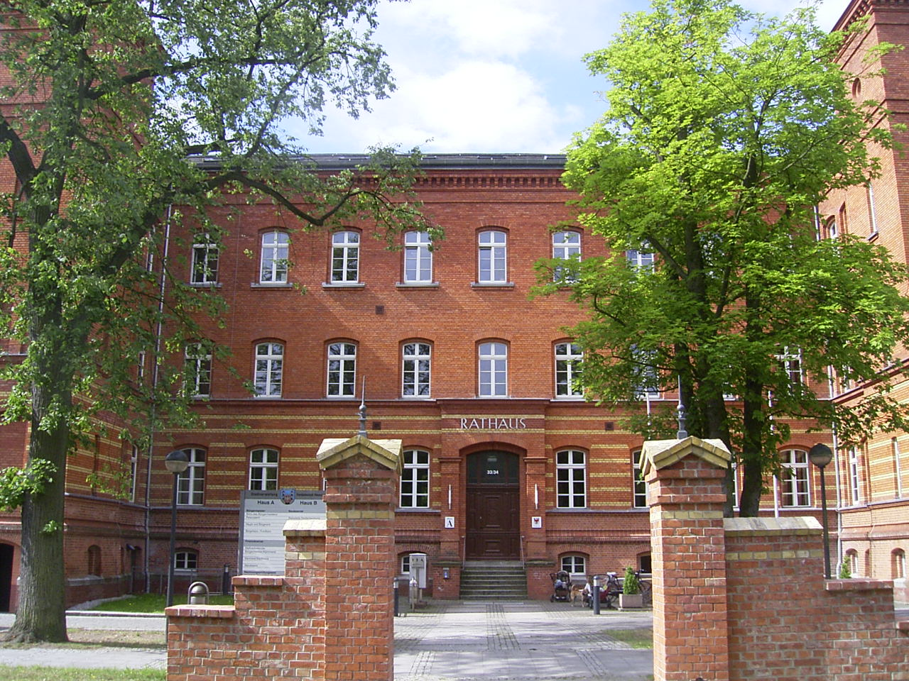 Das Rathaus in Neuruppin wurde ursprünglich als Garnisonslazarett errichtet.